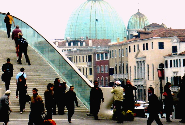 Venezia: Ponte della Costituzione, cupole di San Simeone Piccolo e Palazzo Emo diedo (con trifora timpanata), visti da Piazzale Roma.